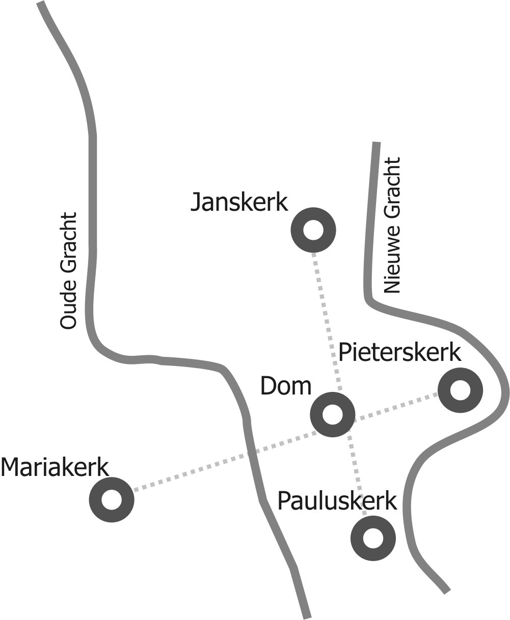 De vijf oorspronkelijke kerken die in de stad Utrecht een kerkenkruis vormden. Afbeelding gemaakt door M.J. Smit op 23 juli 2006.